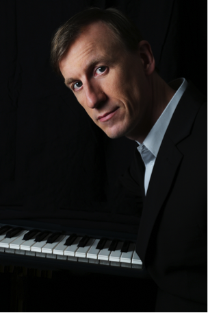 Pianist Komponist Arrangeur Gerald Schuller